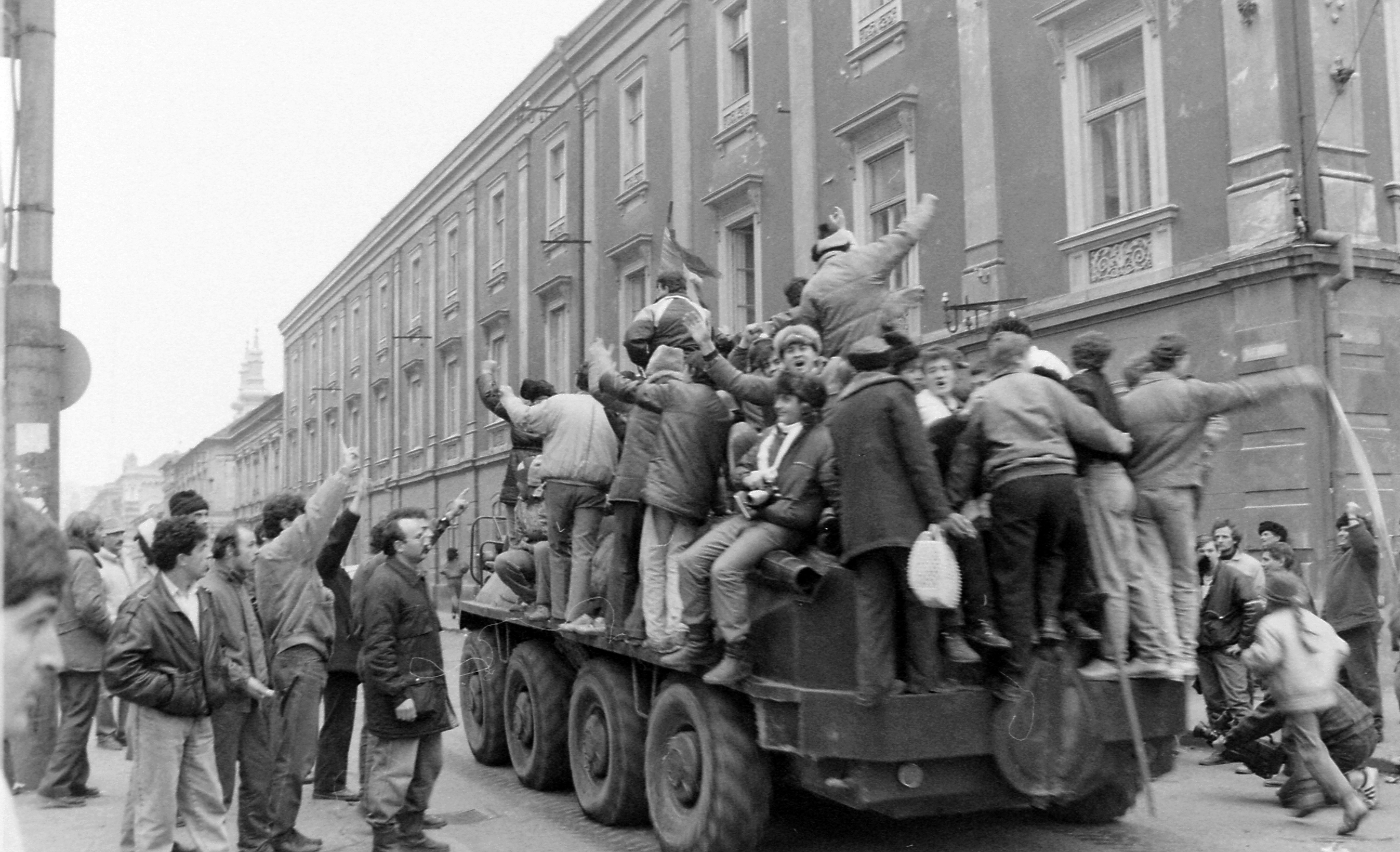 strada Emanoil Ungureanu. Romániai forradalom. Location: Romania, Transylvania, Timisoara Tags: street view, revolution, combat vehicle Title: strada Emanoil Ungureanu. Romániai forradalom.